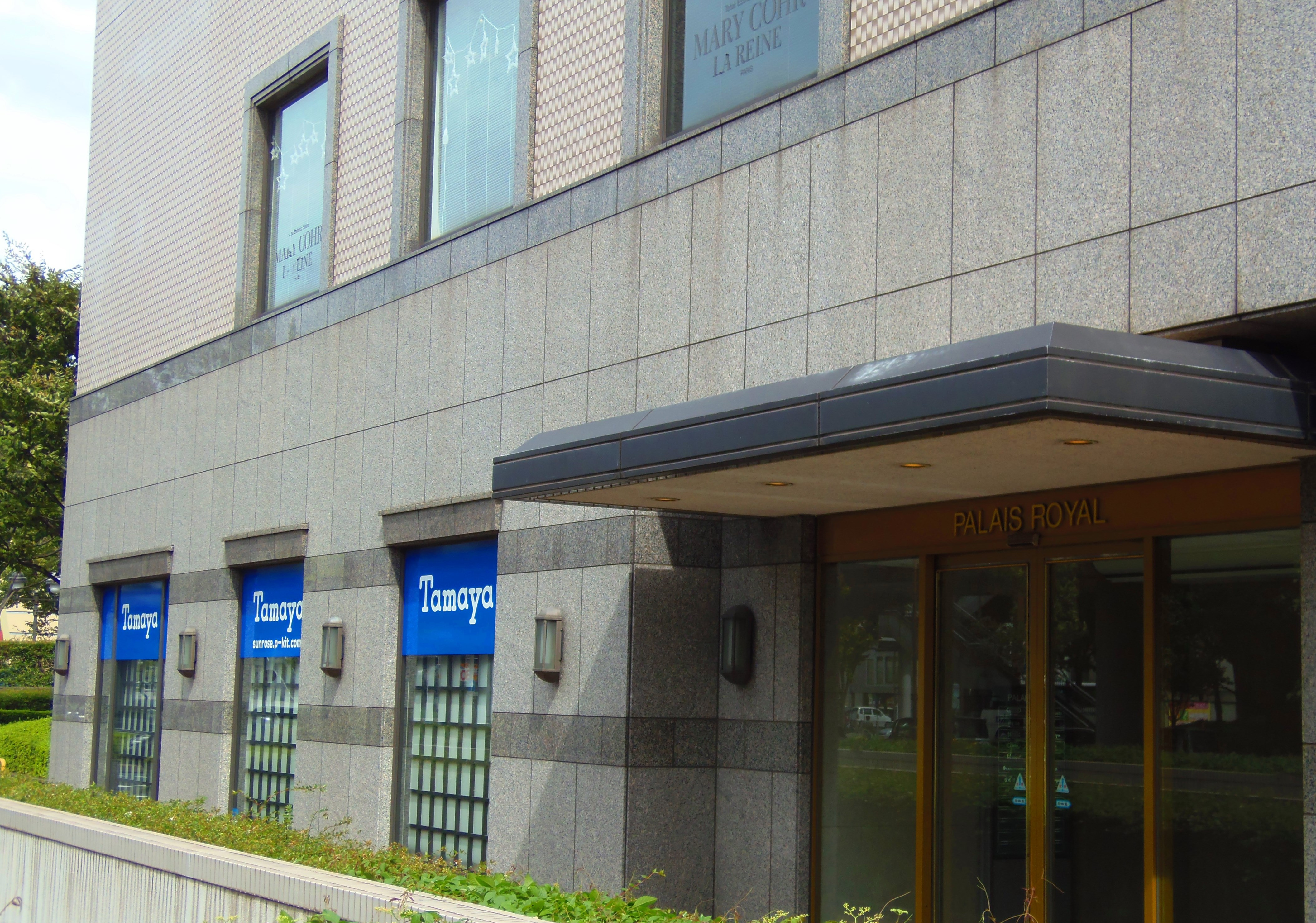 北九州市の小倉駅新幹線口リーガロイヤルホテル1Fにある玉屋サンローズ